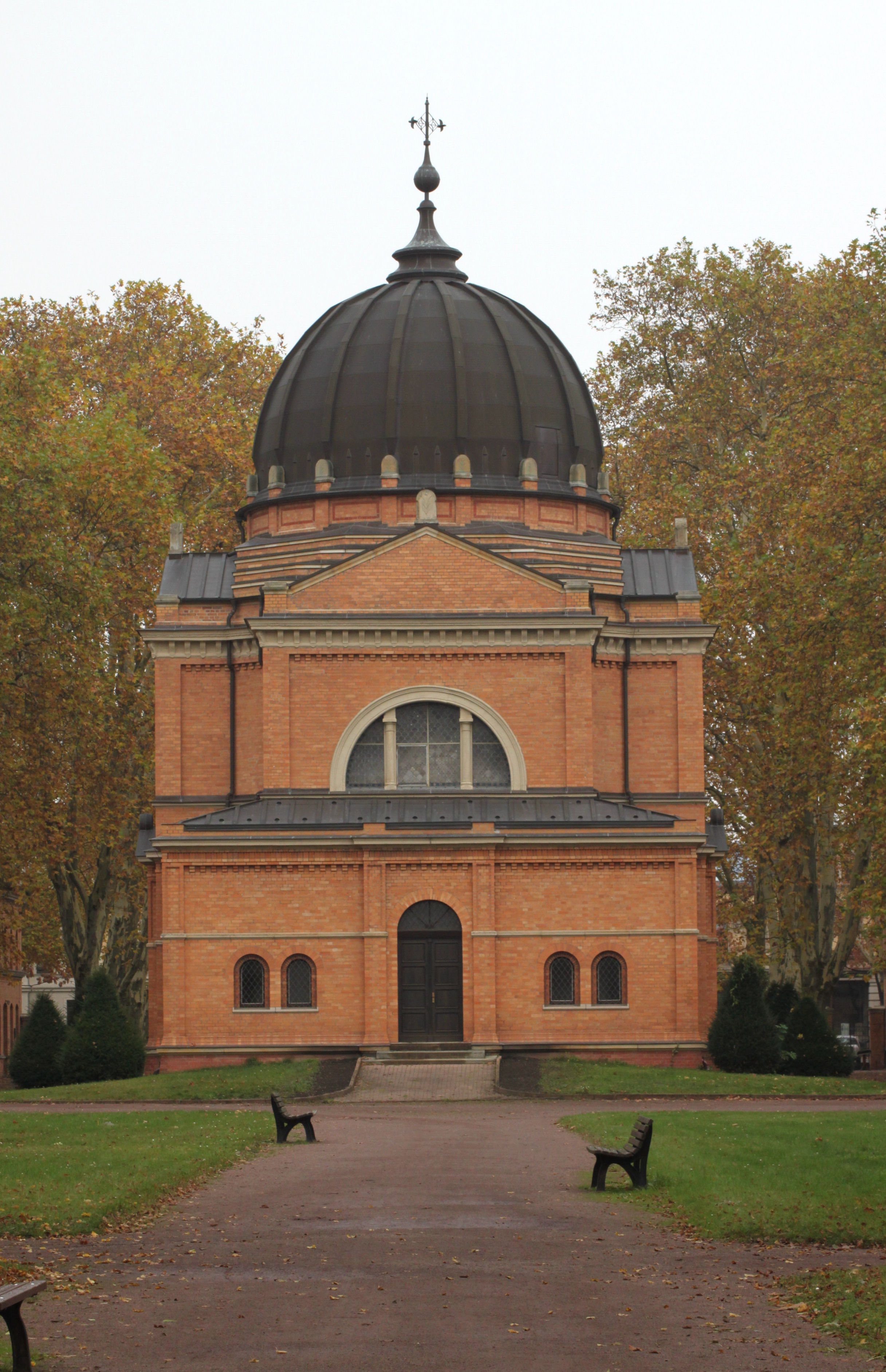 Halle (Saale), Südseite der Friedhofskapelle auf dem Südfriedhof, erbaut 1887, Huttenstraße 25 Standort: 51° 27´ 41,65´´ N 11° 58´37,56´´ O